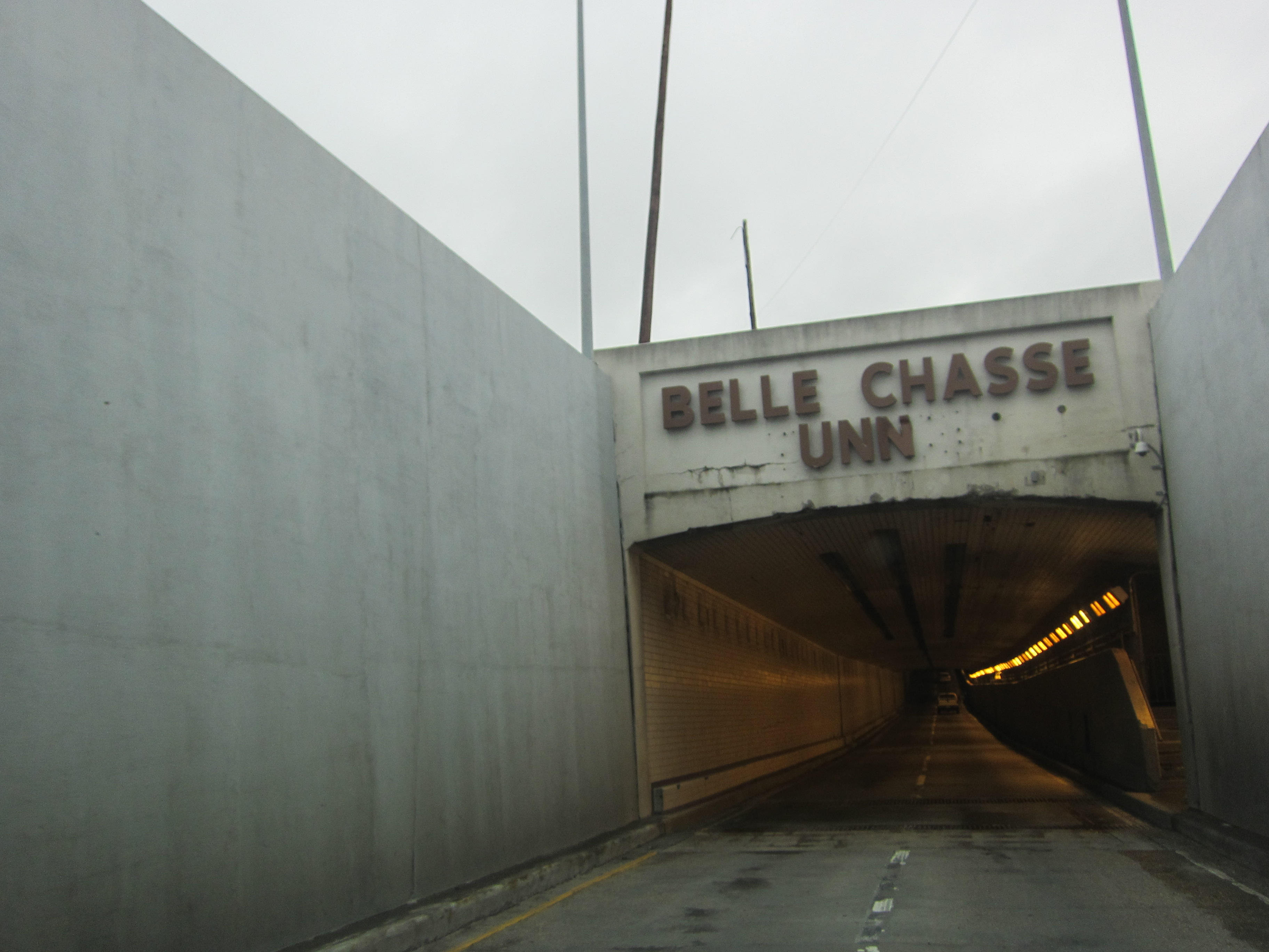 Belle Chasse Louisiana tunnel is missing some letters.